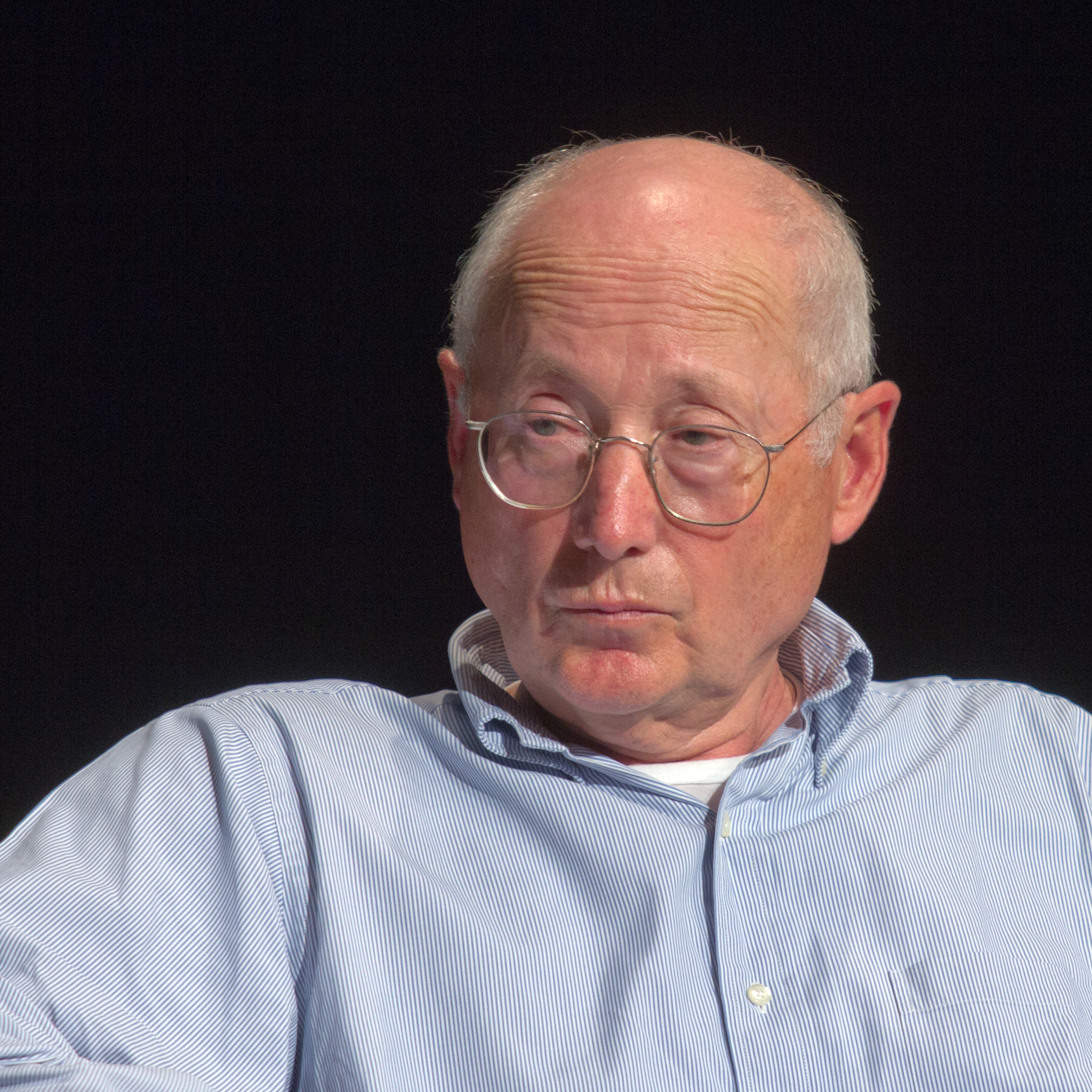 Birlikte - Podiumsdiskussion mit Heiko Maas (Bundesminister der Justiz und für Verbraucherschutz), Stefan Aust (Journalist), Mehmet Daimagüler (Rechtsanwalt im NSU-Prozess), Anetta Kahane (Vorsitzende der Amadeu Antonio Stiftung), Abdulla Özkan (Augenzeuge). Moderation: Hans-Ulrich Jörges, Mitglied der stern-Chefredaktion. Ort: Depot des Schauspiel Köln Foto: Stefan Aust